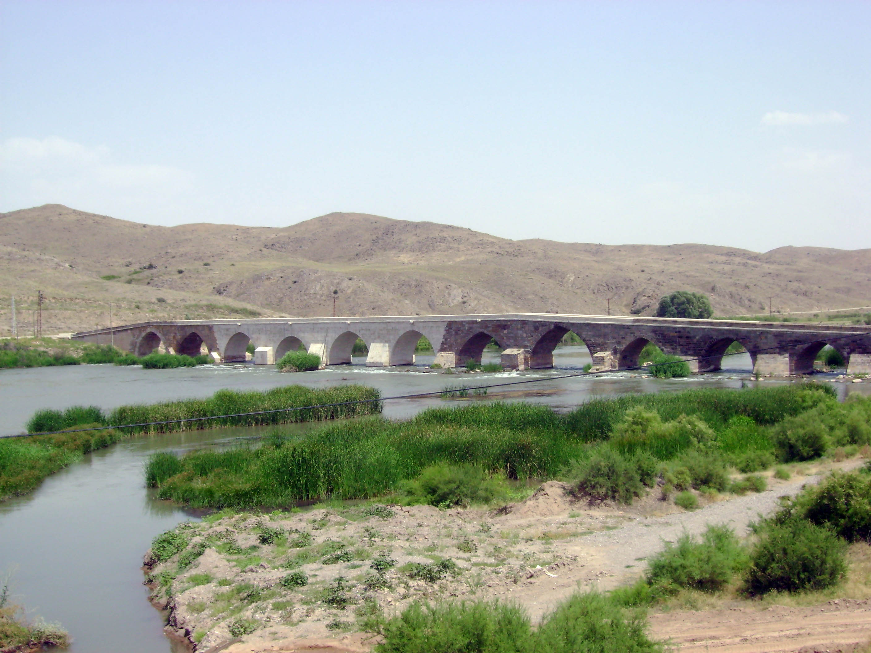 Kesikköprü Bridge / Kırşehir